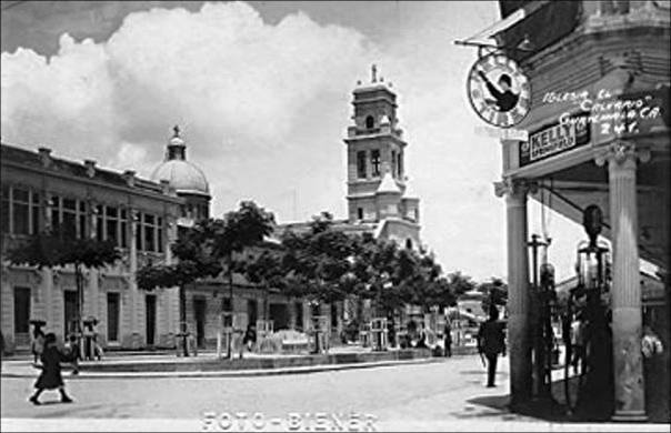 Fotografía del Nuevo Calvario de la Ciudad de Guatemala.